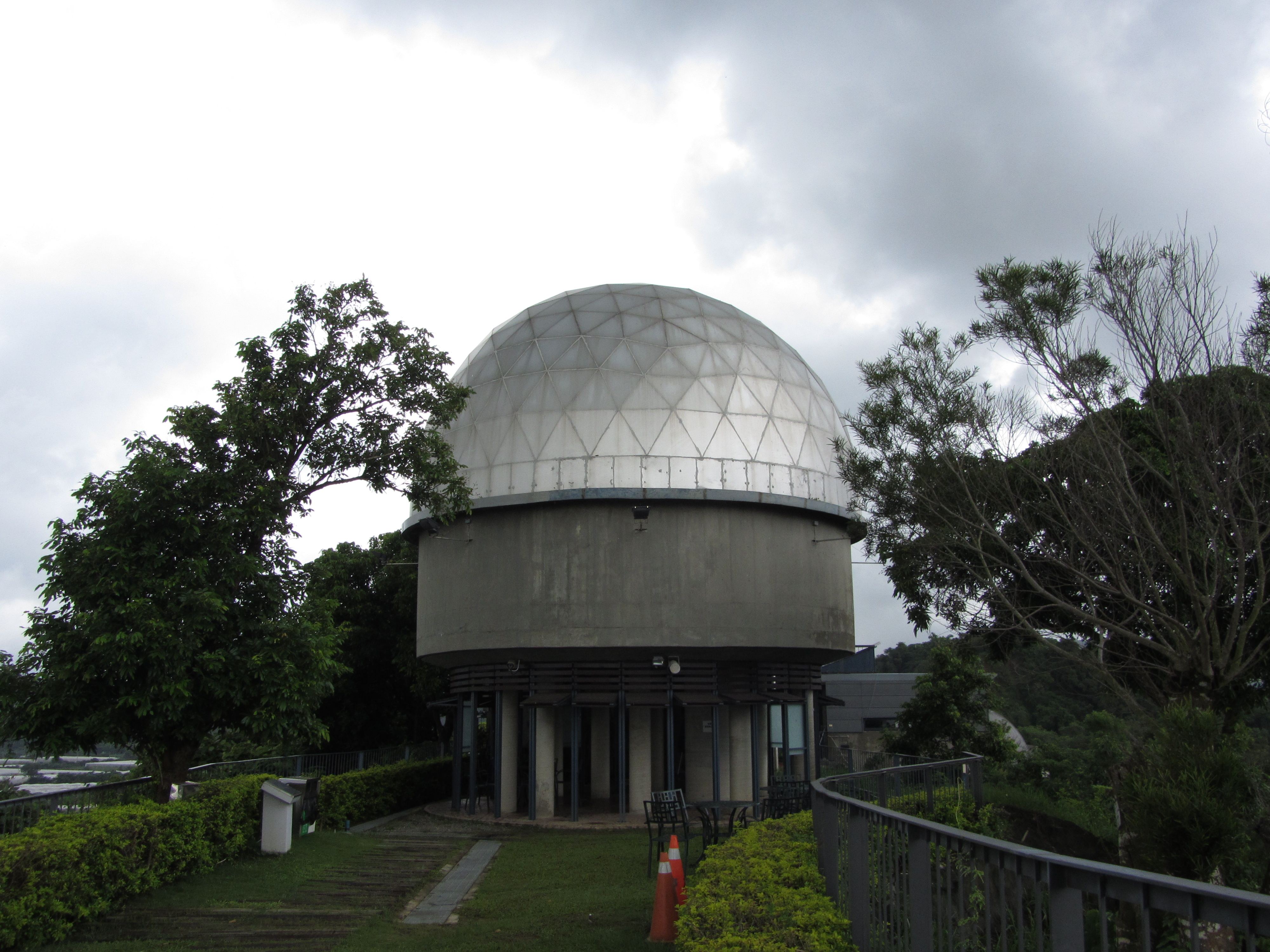 南瀛天文教育園區望遠鏡圓頂